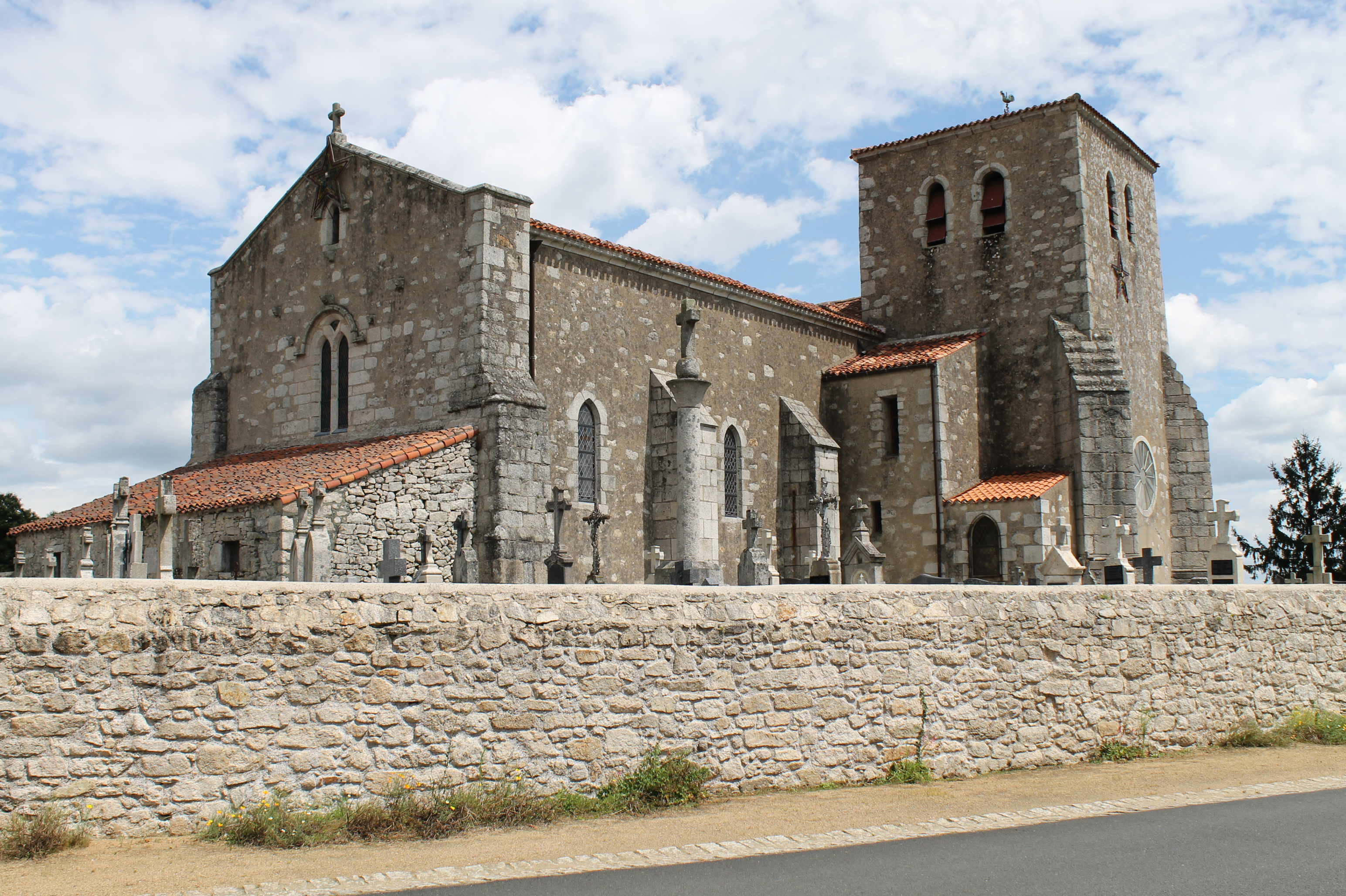 Église Notre-Dame-de-l'Assomption de Châtelliers